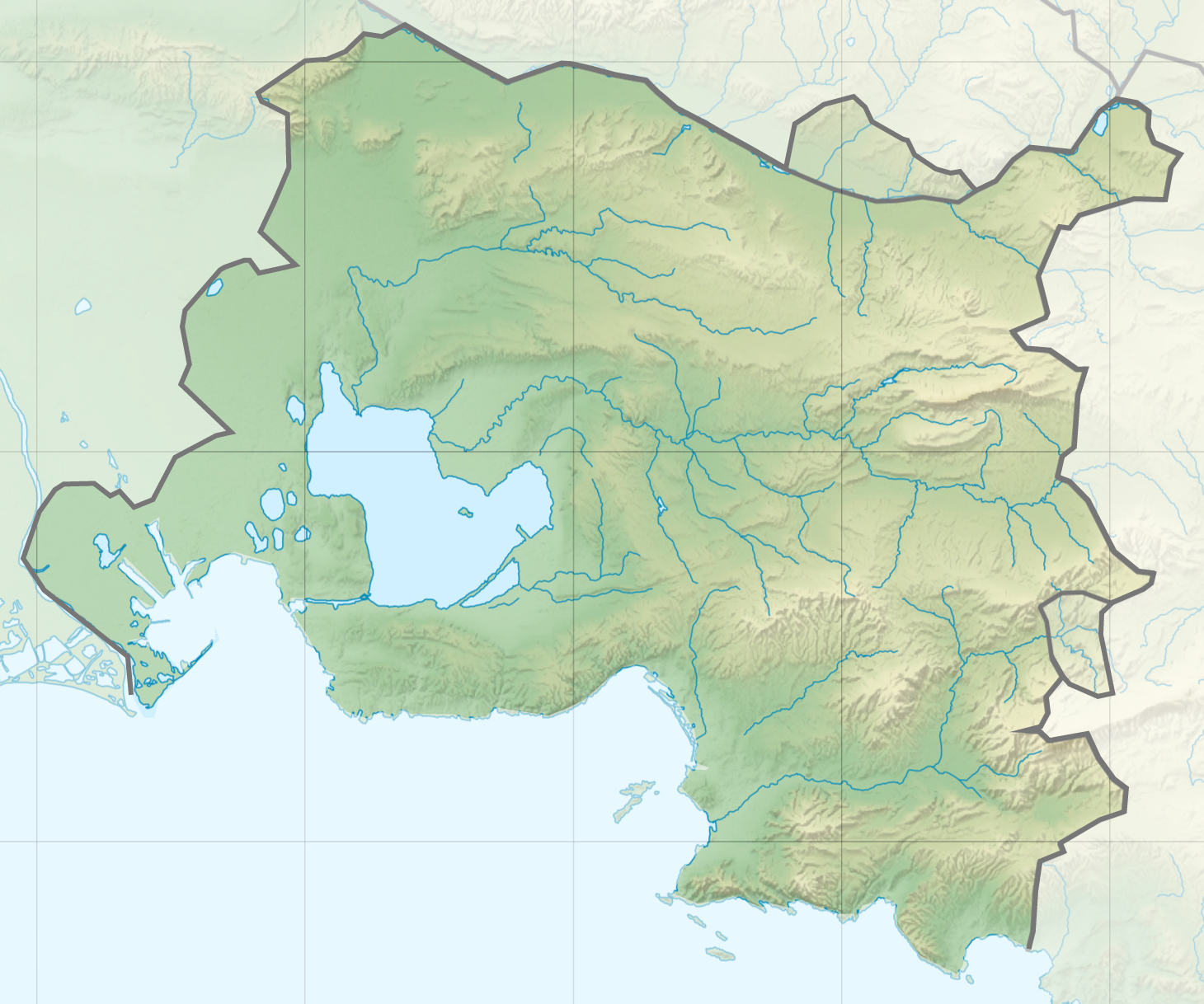 Carte topographique de la métropole d'Aix-Marseille-Provence au sein des Bouches-du-Rhône.